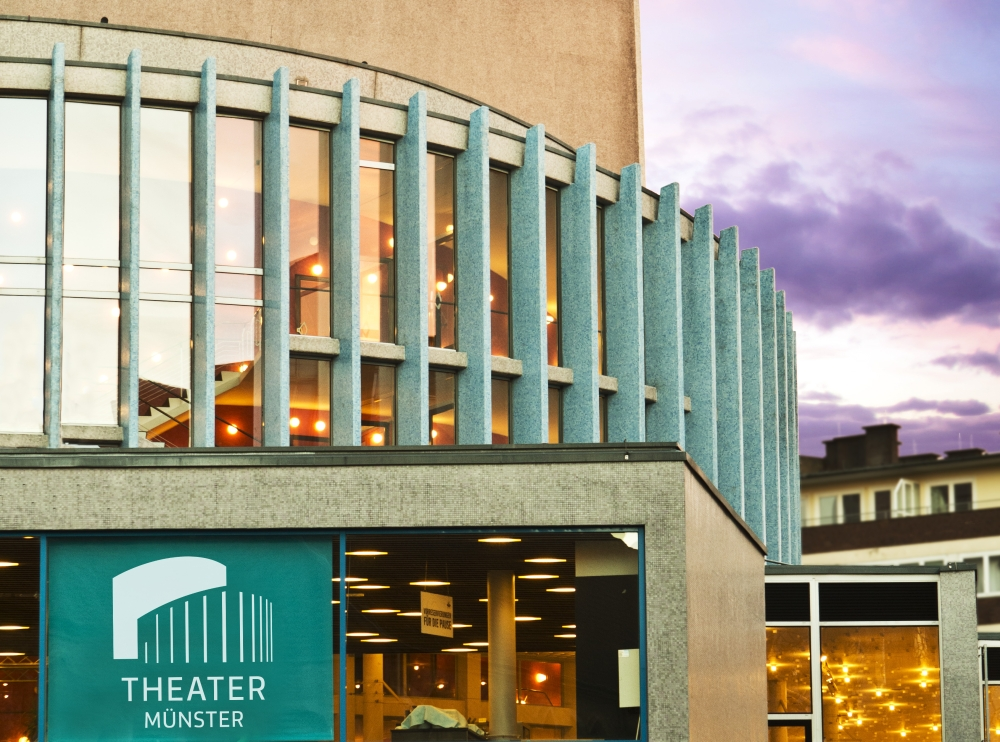 Außenansicht des Theater Münster mit seiner einzigartigen Architektur